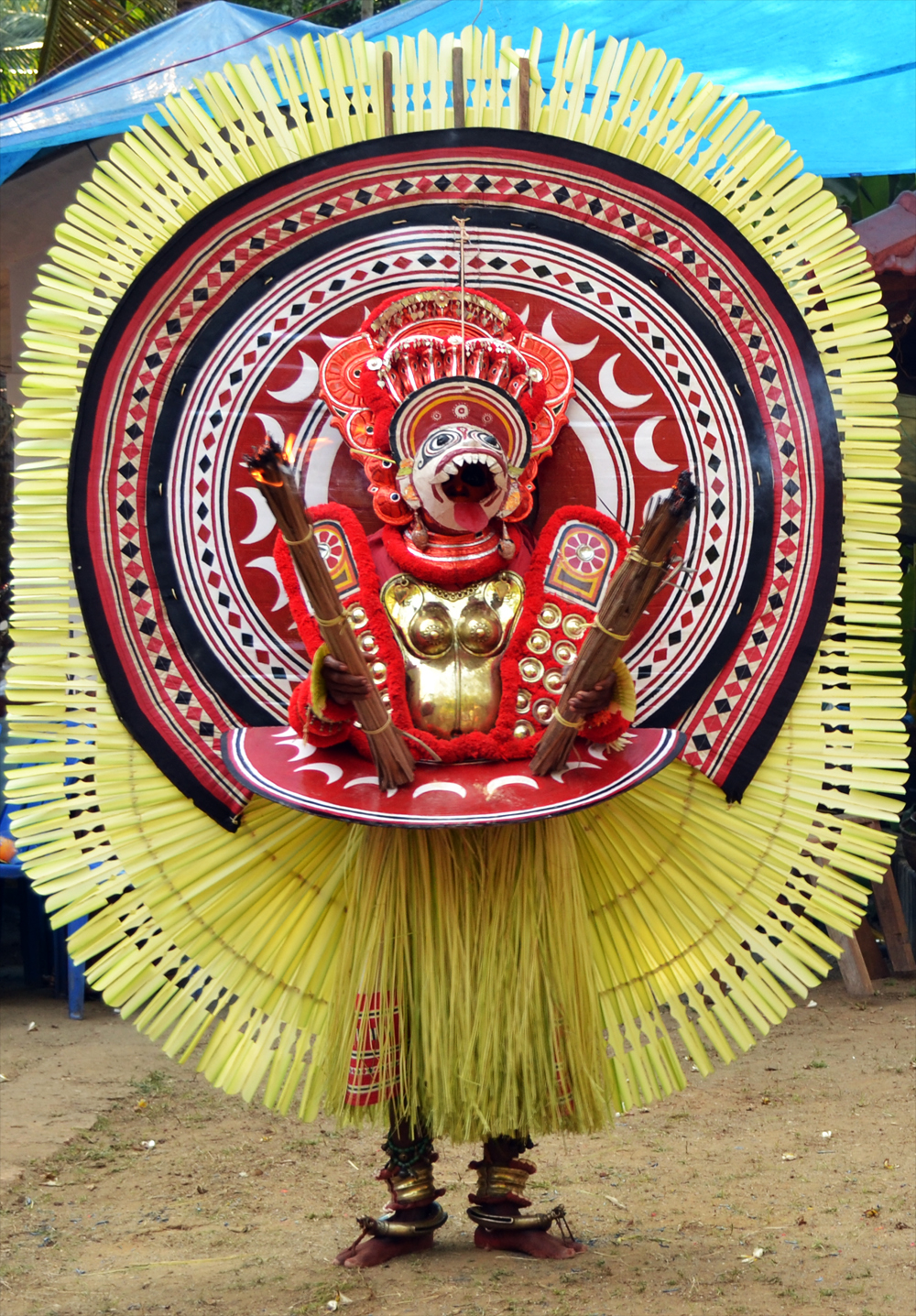 കുണ്ടാടി ചാമുണ്ഡി തെയ്യം